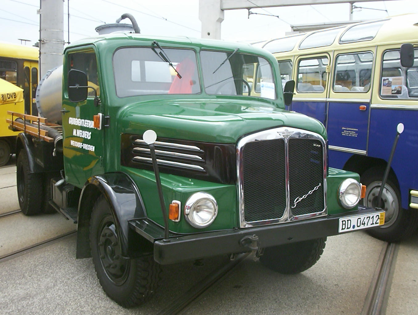 IFA S4000-1 für den Abwassertrabtransport